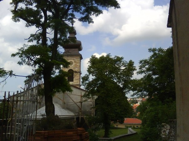 Pravoslavna crkva u Livnu-pogled straga